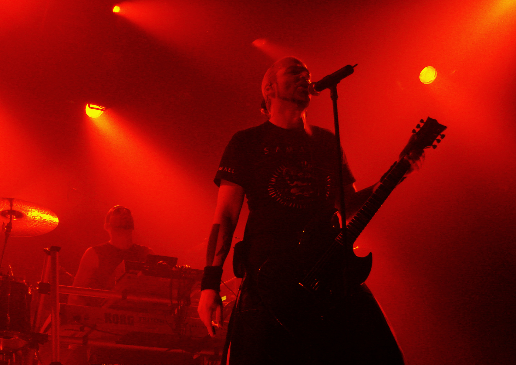 Samael en concert à la Locomotive, à Paris, le 11 Janvier 2009: Xy et Vorph.